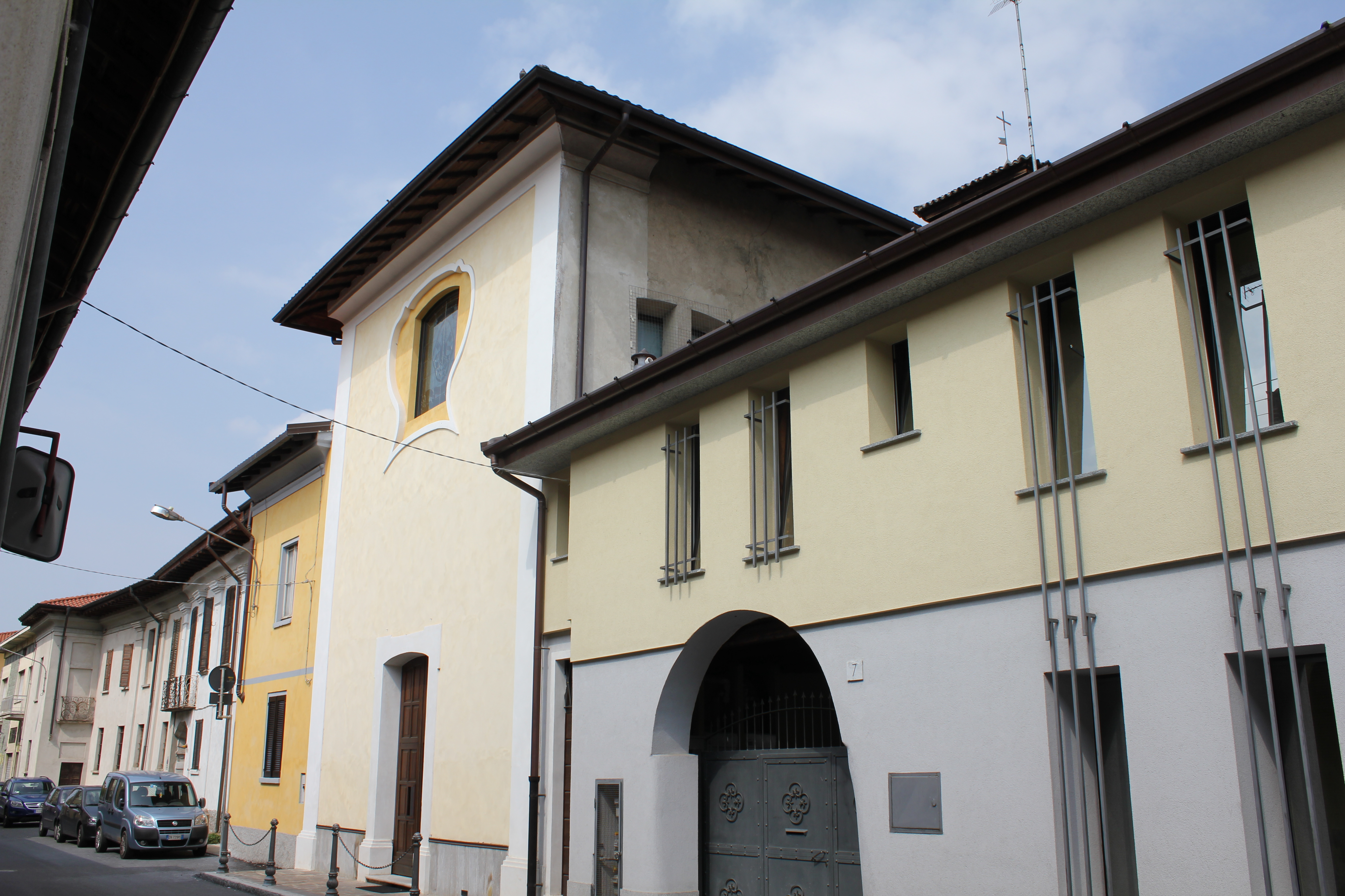 Chiesa di sant'Antonio da Padova - Busto Arsizio (quartiere di Borsano)